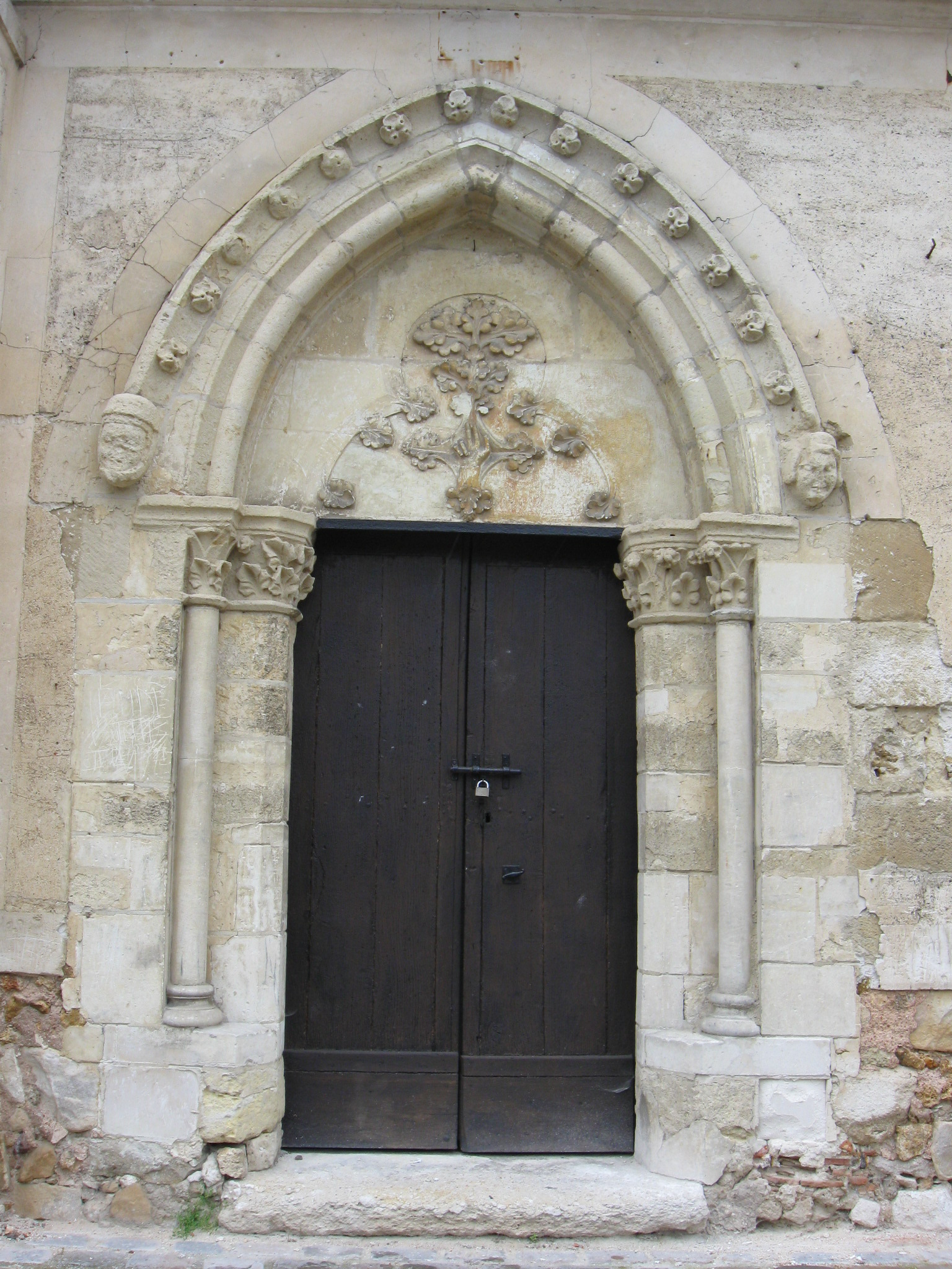 Portail de l'église Saint-Etienne de Chamigny. (département de la Seine-et-Marne, région Île-de-France).